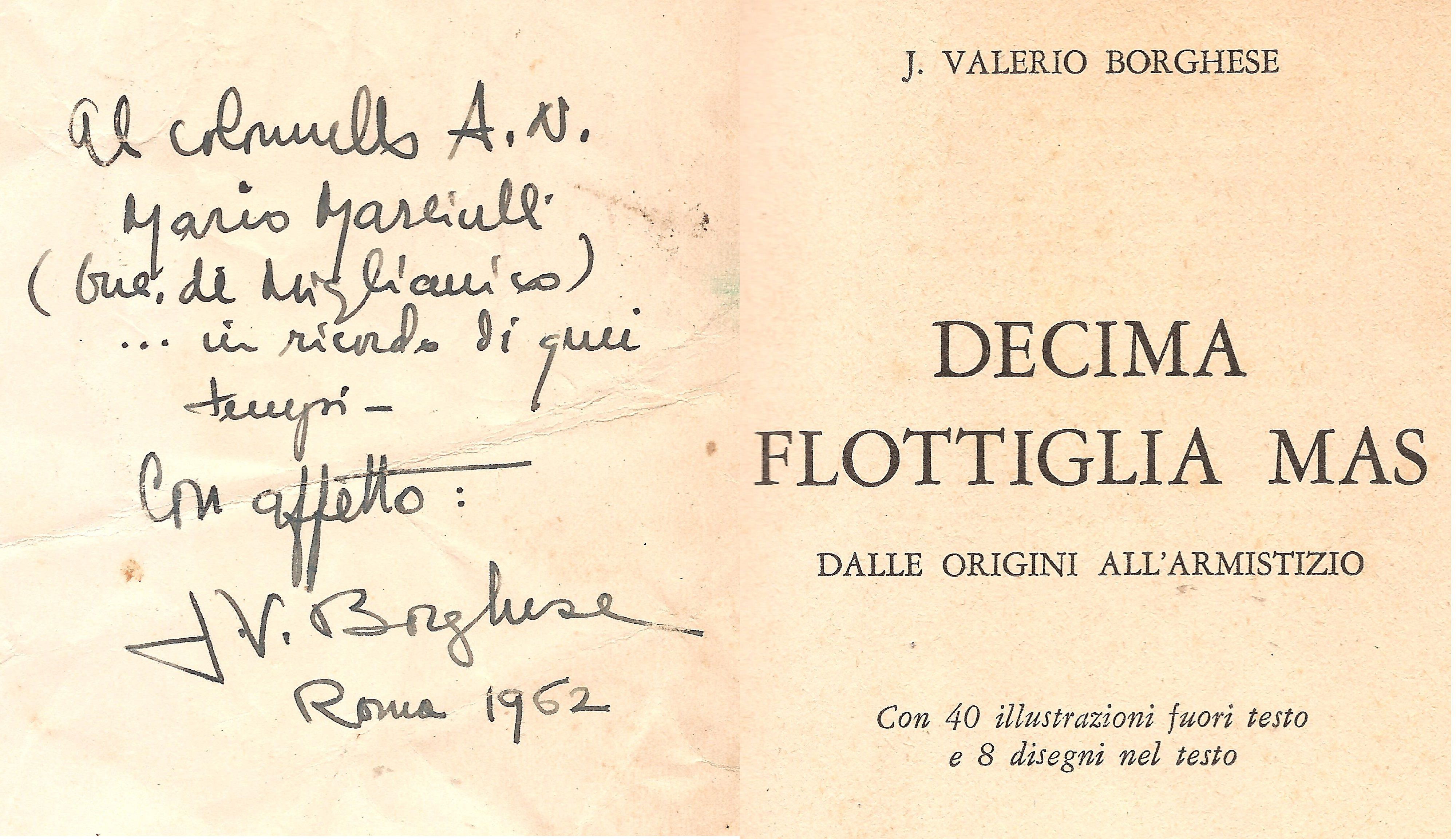 librodecimaflottigliafirmaborghese